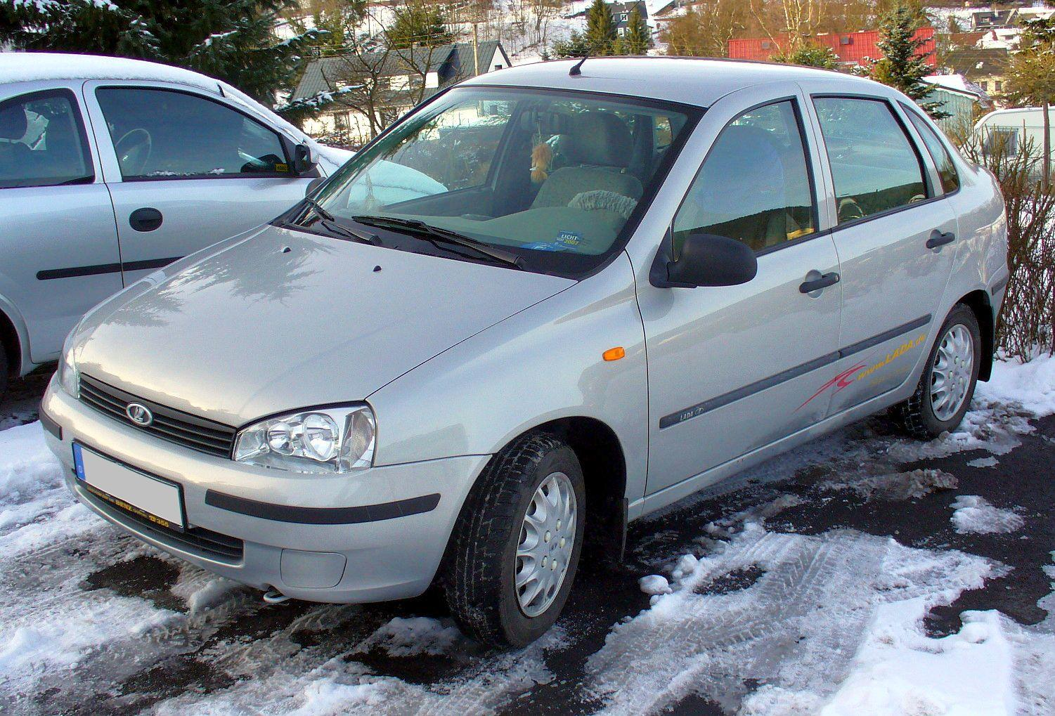 Lada Kalina